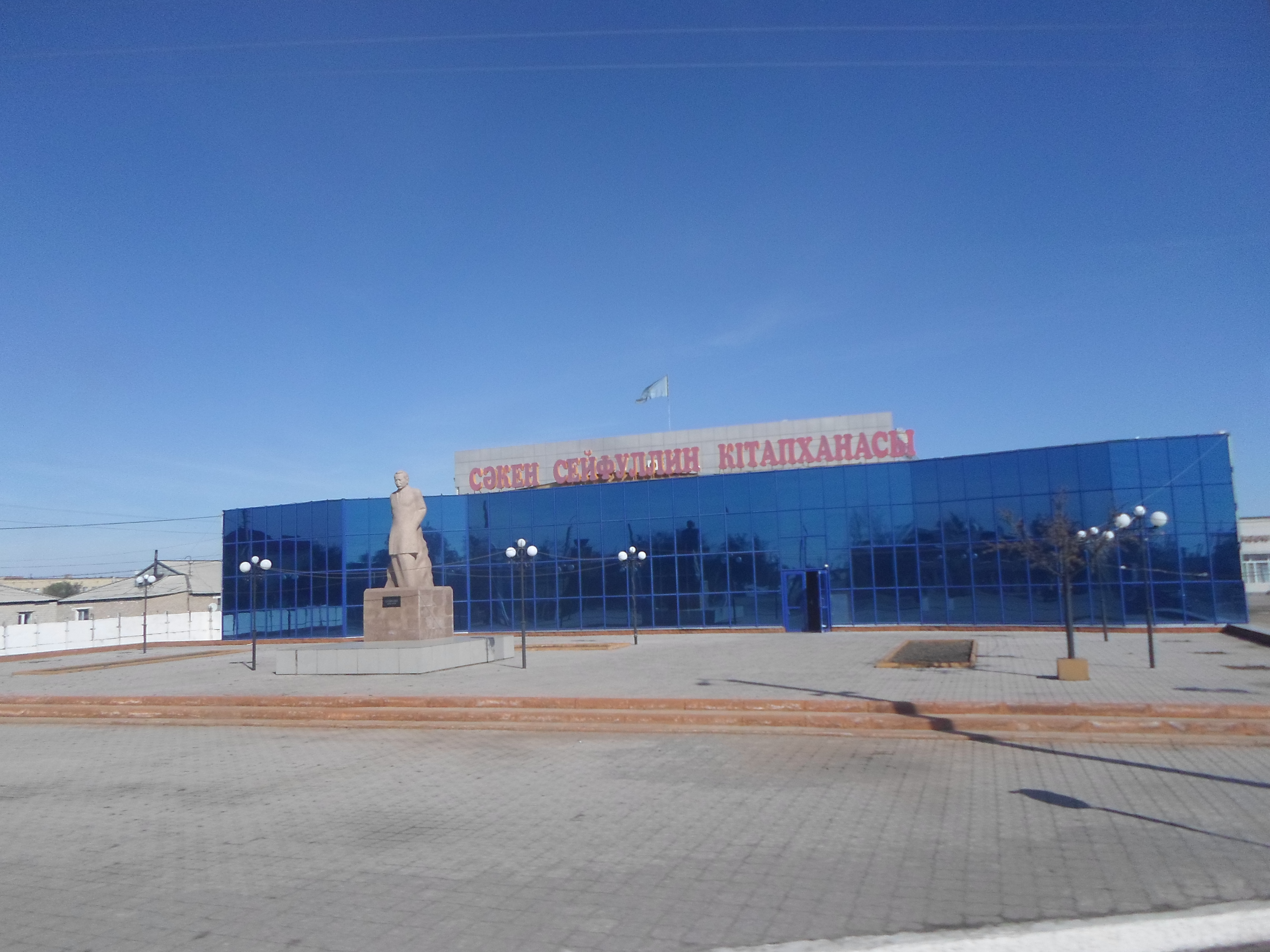 Сәкен Сейфуллин Кітапханасы